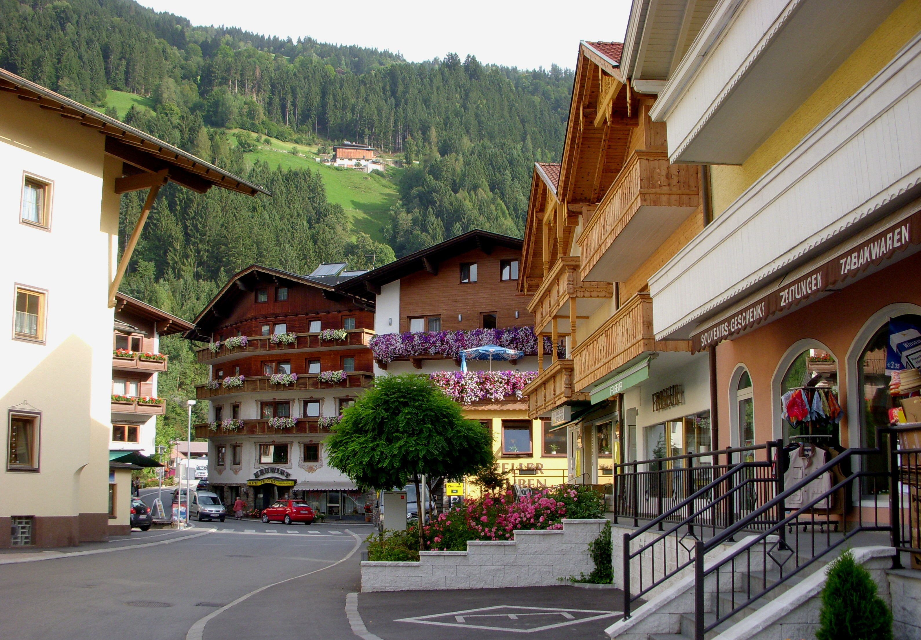 Zell am Ziller, Österreich